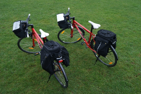 Déi zwéi Vëloen